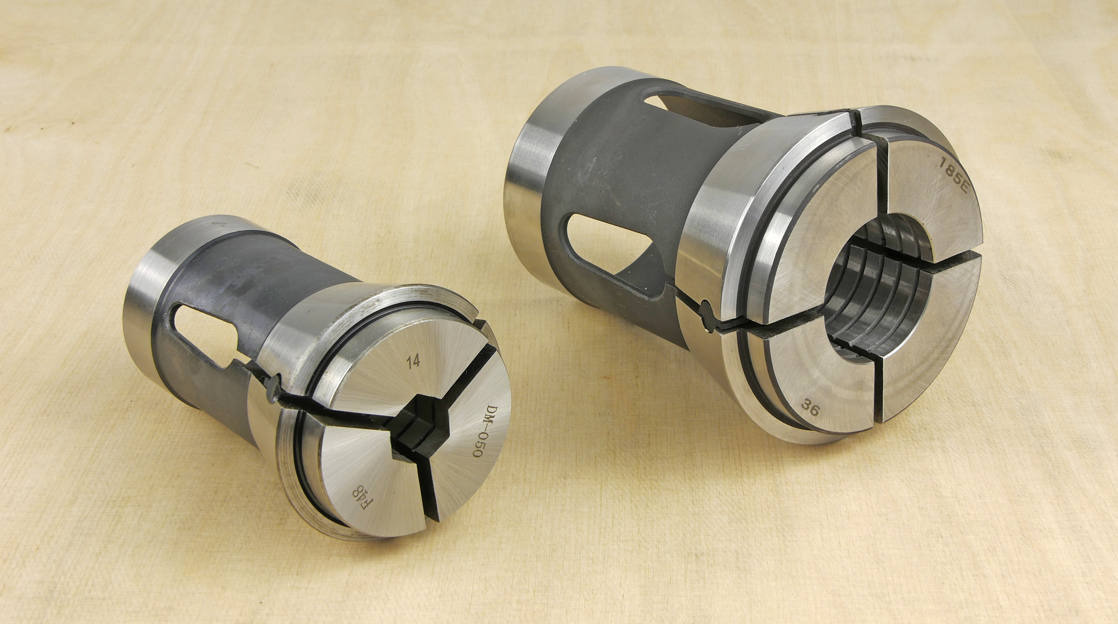 Tulejki automatowe wykorzystywane są w automatach tokarskich.